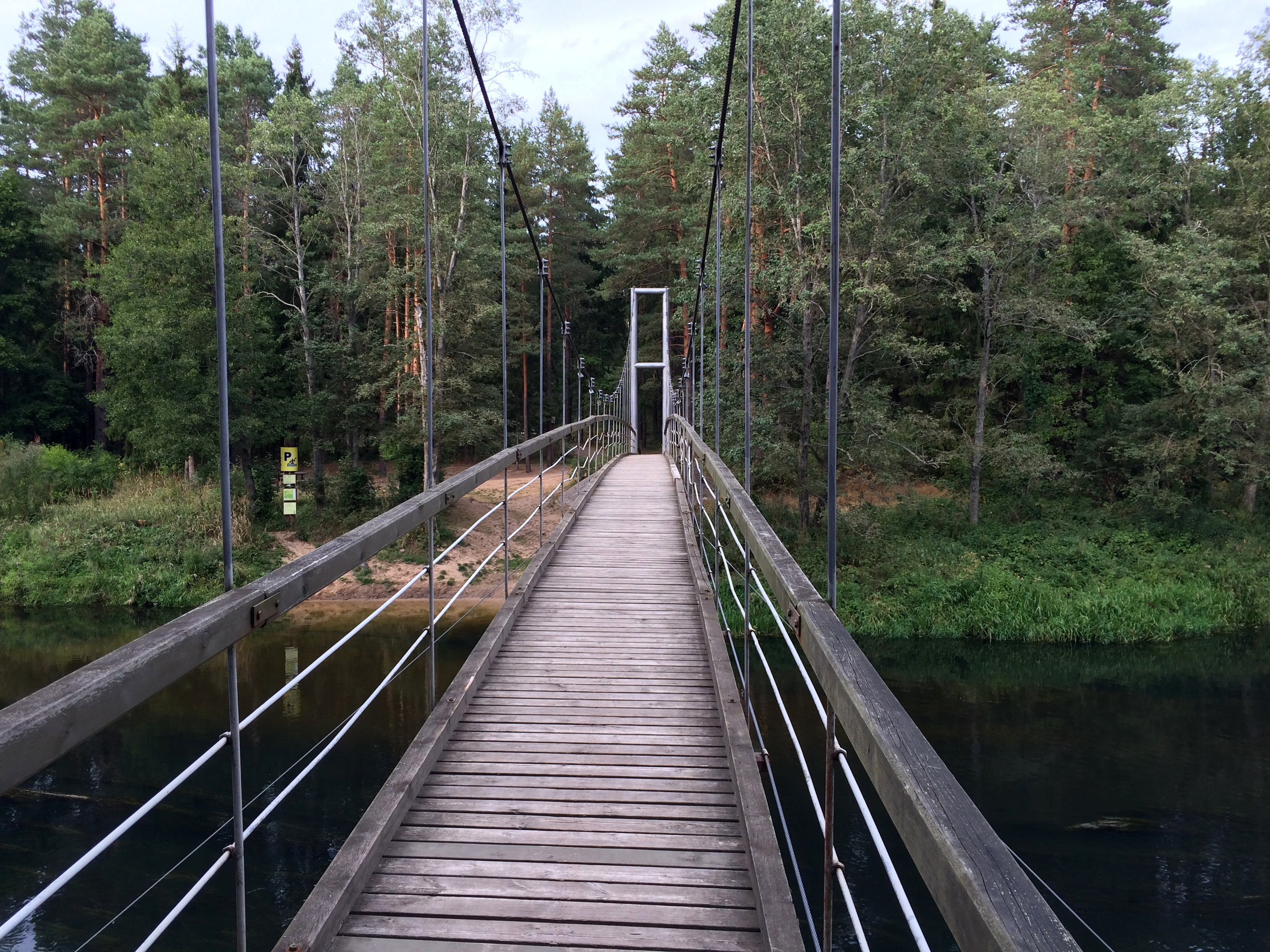 Mikierių tiltas